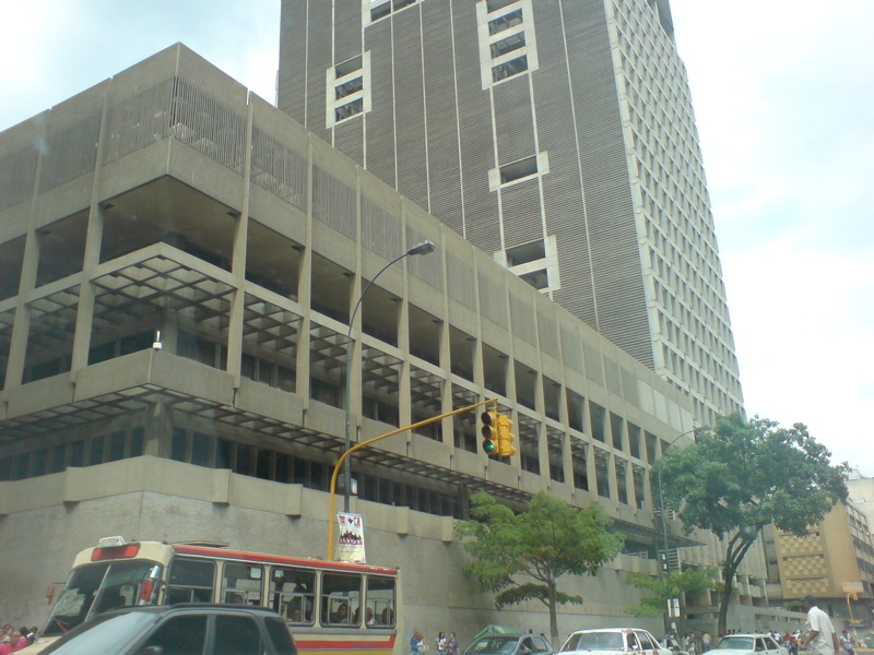 BCV Building, Caracas, Venezuela.